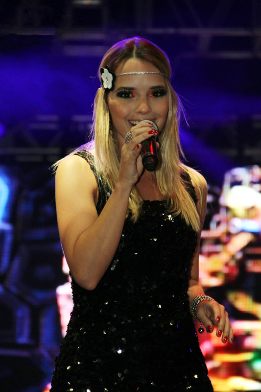 Thaeme Mariôto com a banda iNova em uma apresentação em fevereiro de 2011.